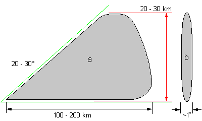 Diagramm einer Fächerantenne a) Seitenansicht b) Frontalansicht